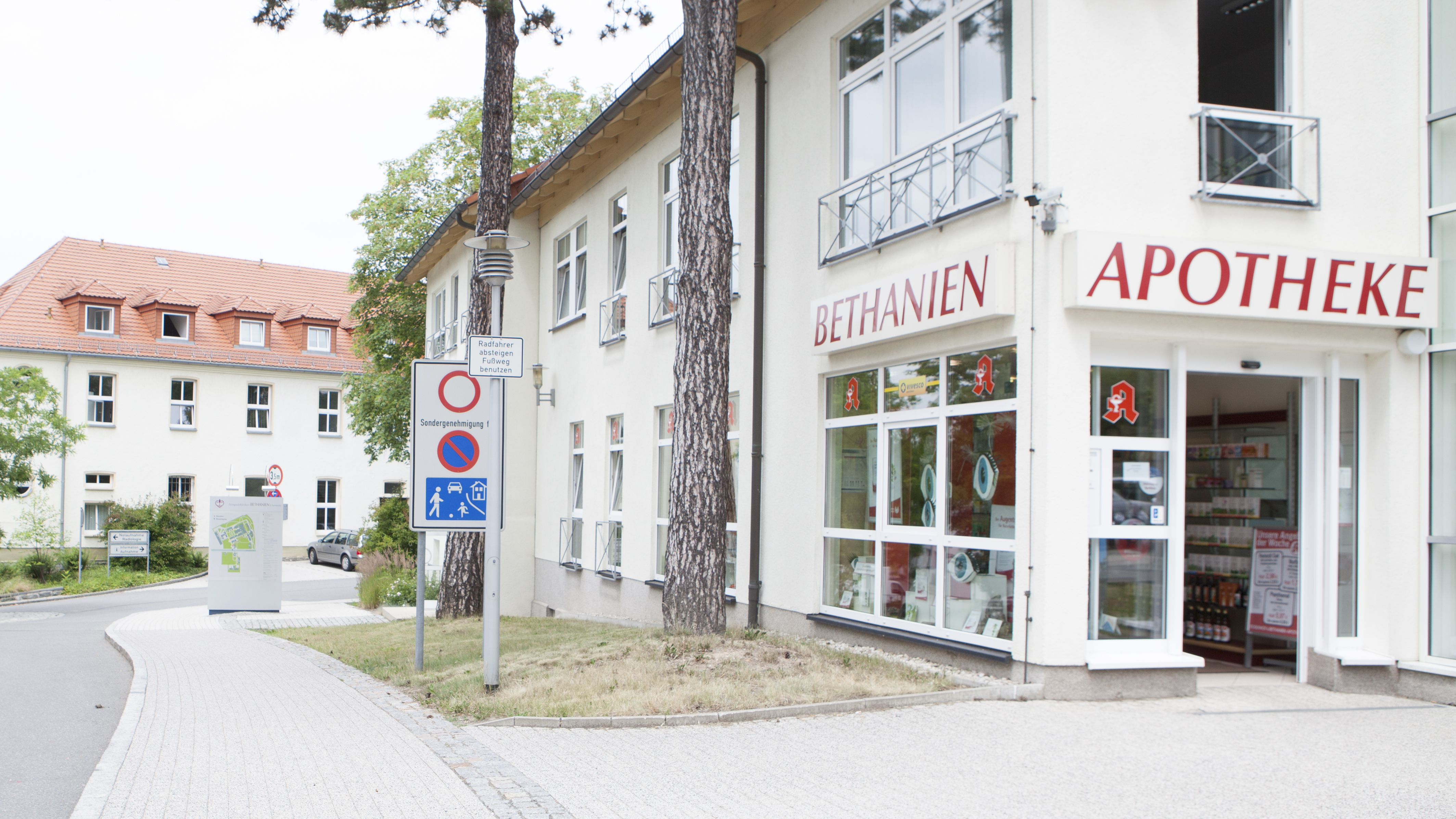 Geschäftsführung im 1.OG